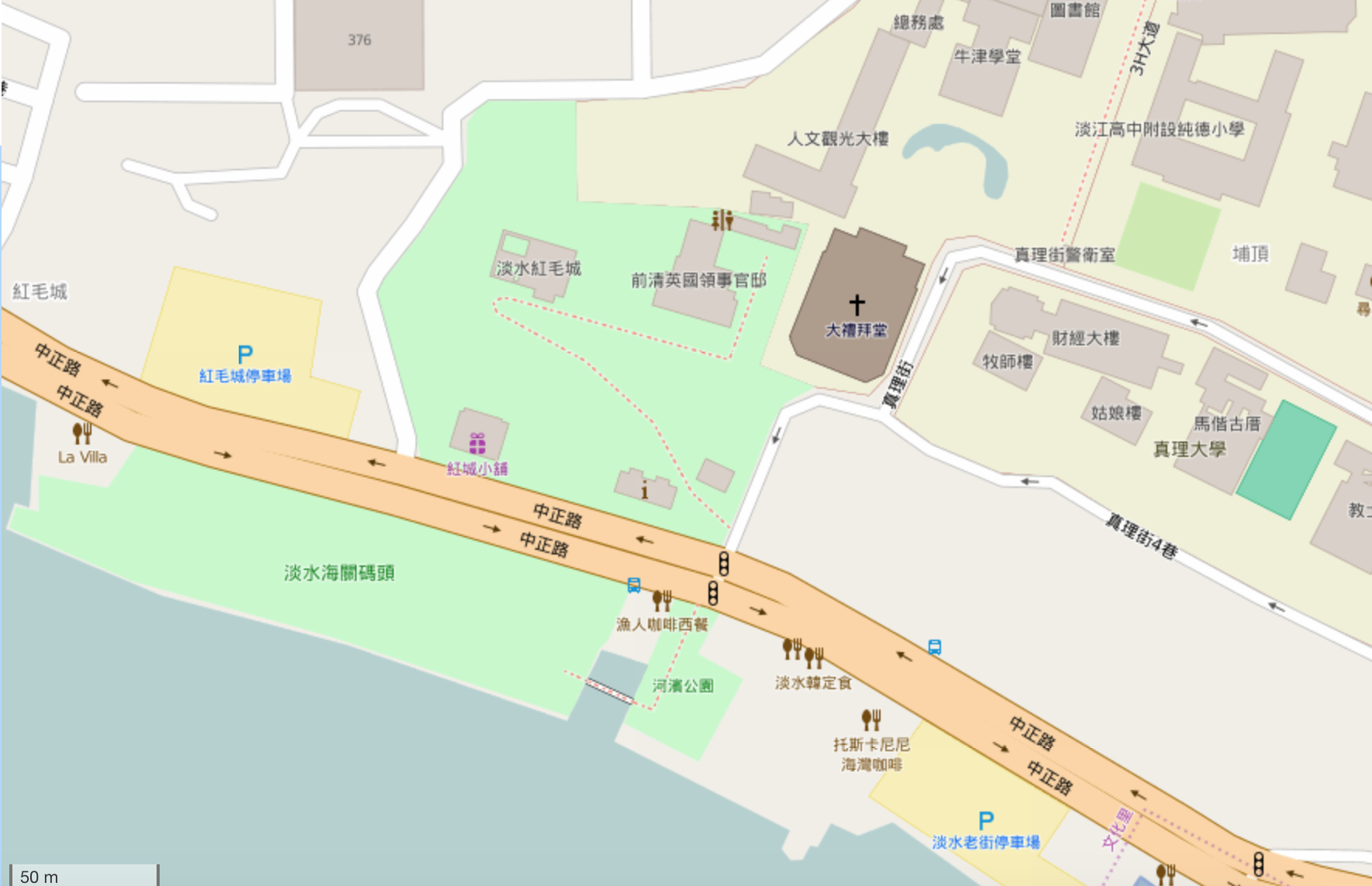 OpenStreetMap上的紅毛城